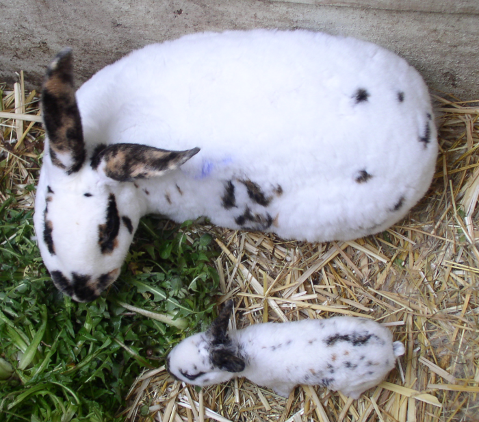 photo prise par moi - domaine public